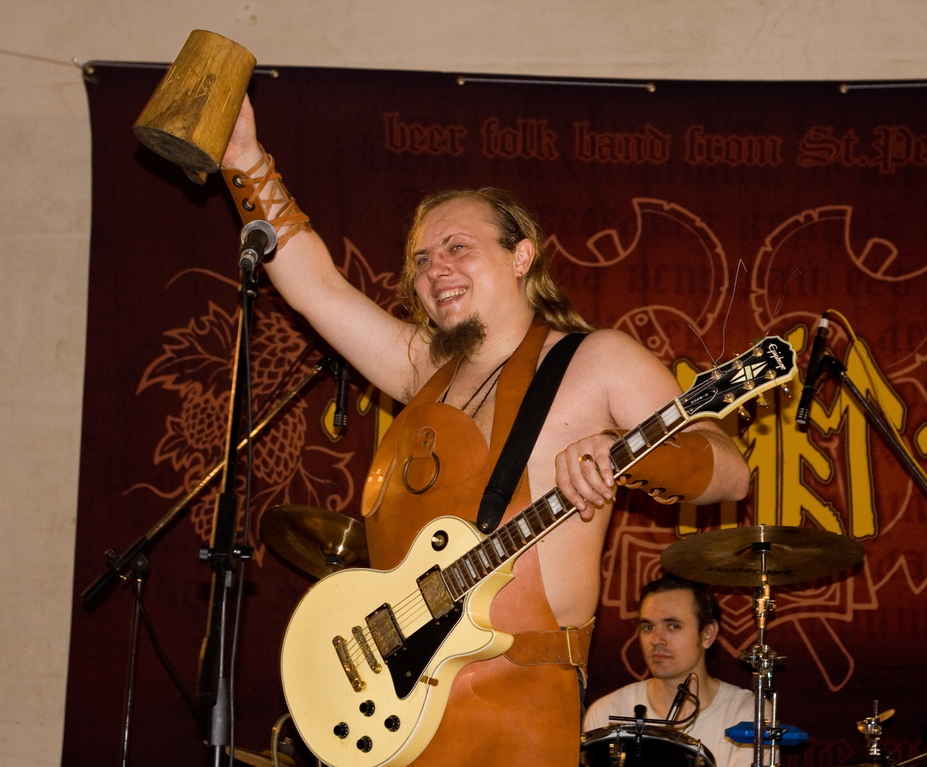 группа "Тролль Гнёт Ель" Troll Gnet El' (Russian group) frontman